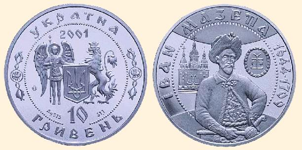 Ювілейна монета, присвячена Іванові Мазепі